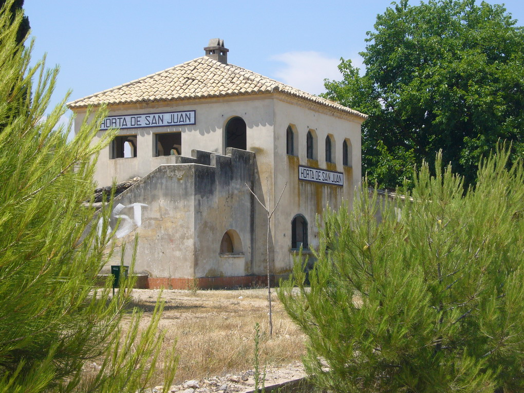 Der verlassene Bahnhof von Horta de Sant Joan an der Via Verde de la Terra Alta andere Versionen